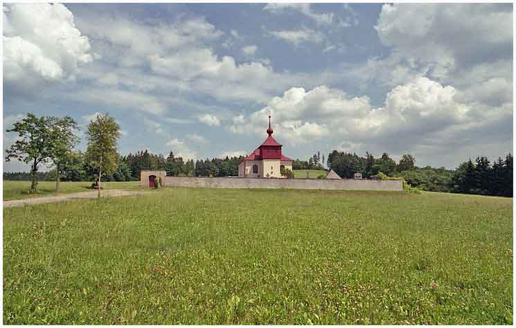 Kostel Svaté Kateřiny u Stříbrných Hor